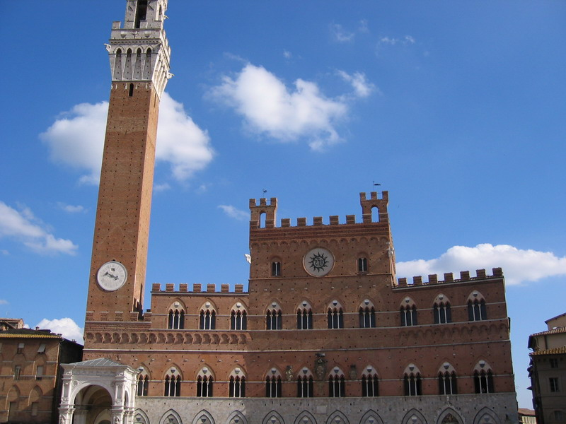 Palazzo Pubblico (Siena).: Palazzo Pubblico (Siena).